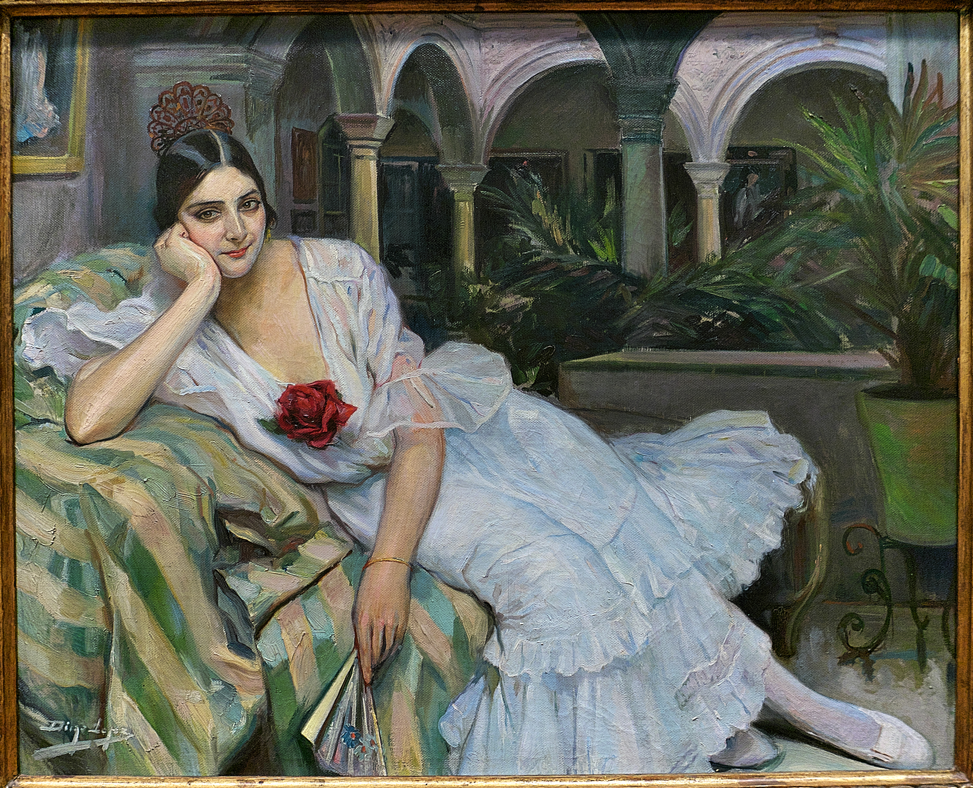 Museo de Bellas Artes de Sevilla. Óleo sobre lienzo, Diego López García (1918).